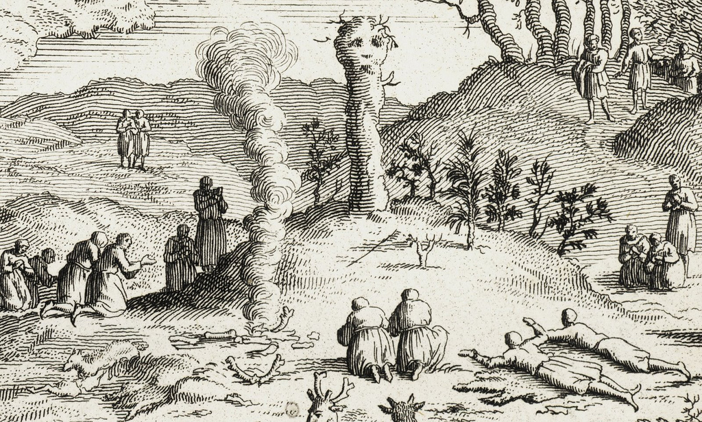 Illustration aus Cérémonies et coûtumes religieuses de tous les peuples représésentés par des figures dessinées par Bernard Picart, Amsterdam 1723-1743, von Jean Frédéric Bernard .